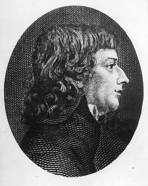 Sogneprest i Lom Peter Andreas Cappelen (1756–1800)